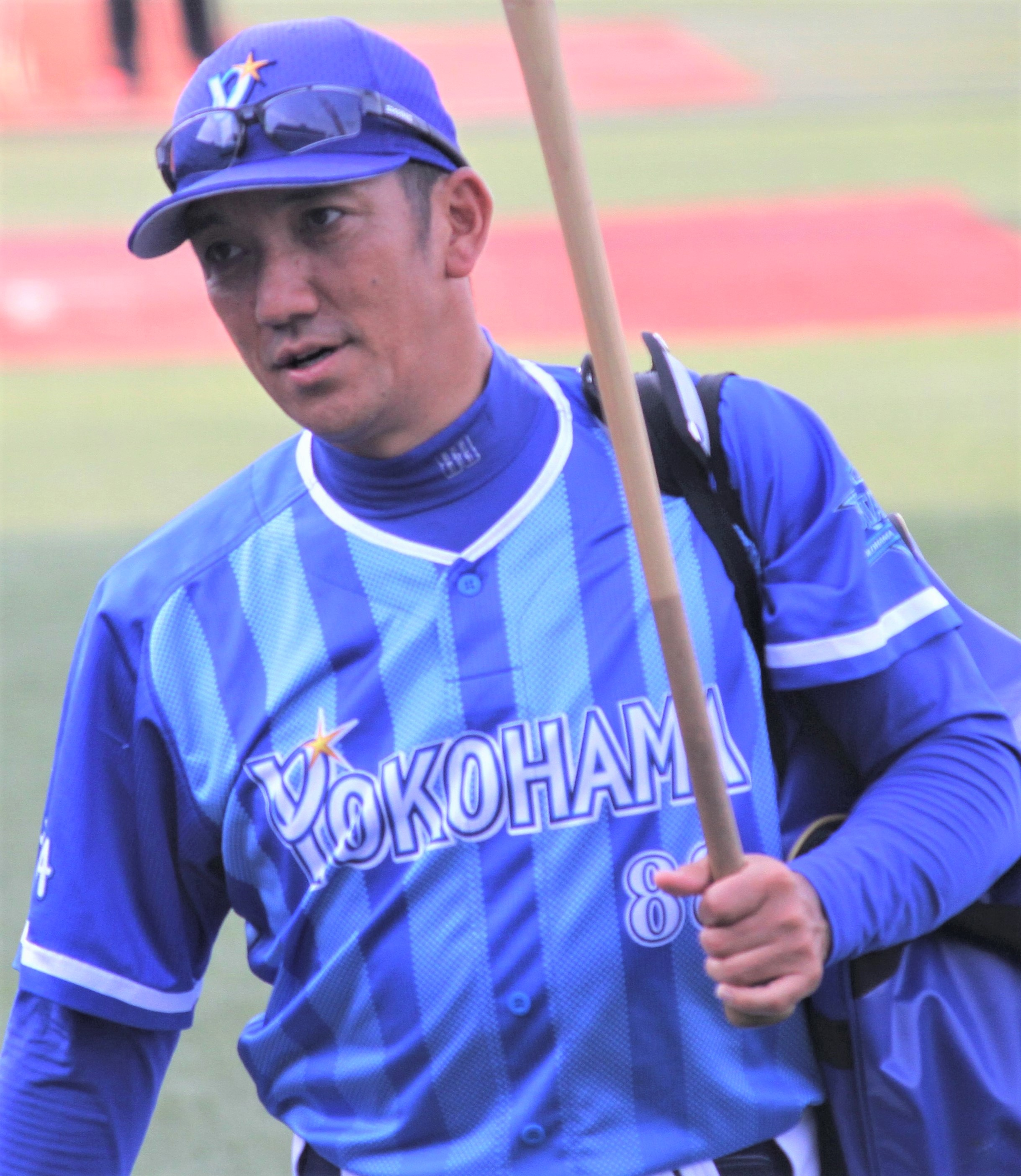 横浜DeNAベイスターズ・コーチの永池恭男。明治神宮野球場にて。